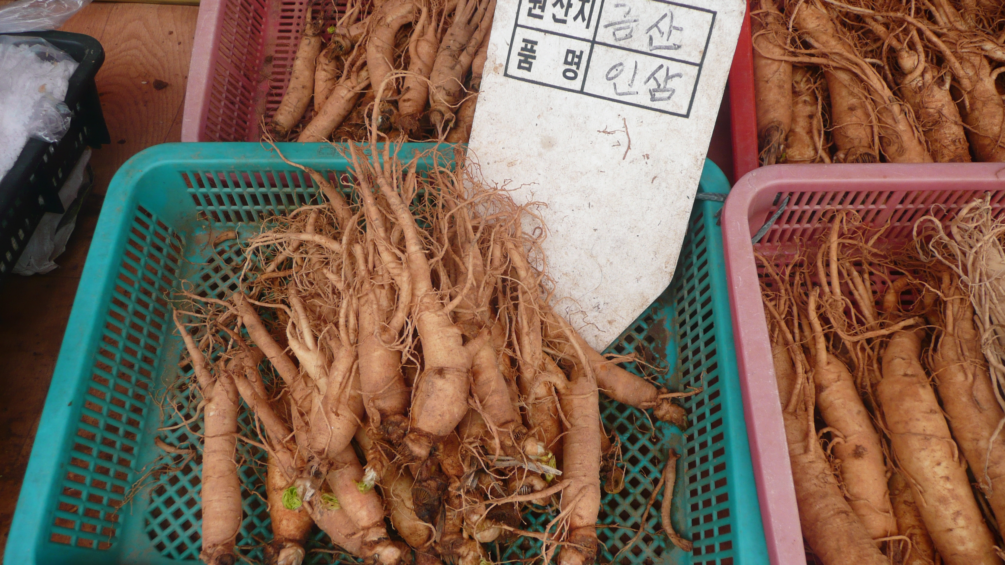 Koreanischer Ginseng, in Busan